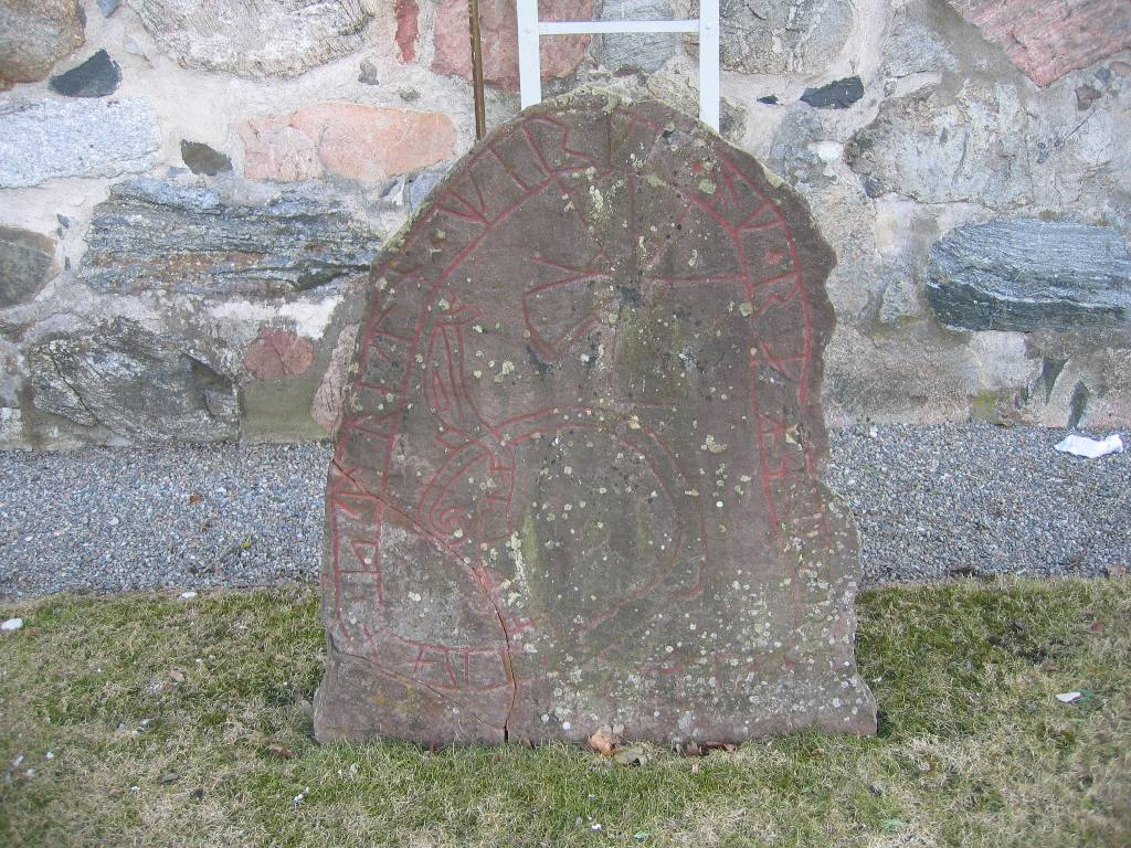 Runstenen U50, Lovö kyrka. U 50 är placerad utanför Lovö kyrka i närheten av U 49, vars inskrift den förmodas vara en fortsättning av. Den fragmentariska texten tolkas: "...märkena efter Johan streten (?) och Ragnvor efter (sin) man."